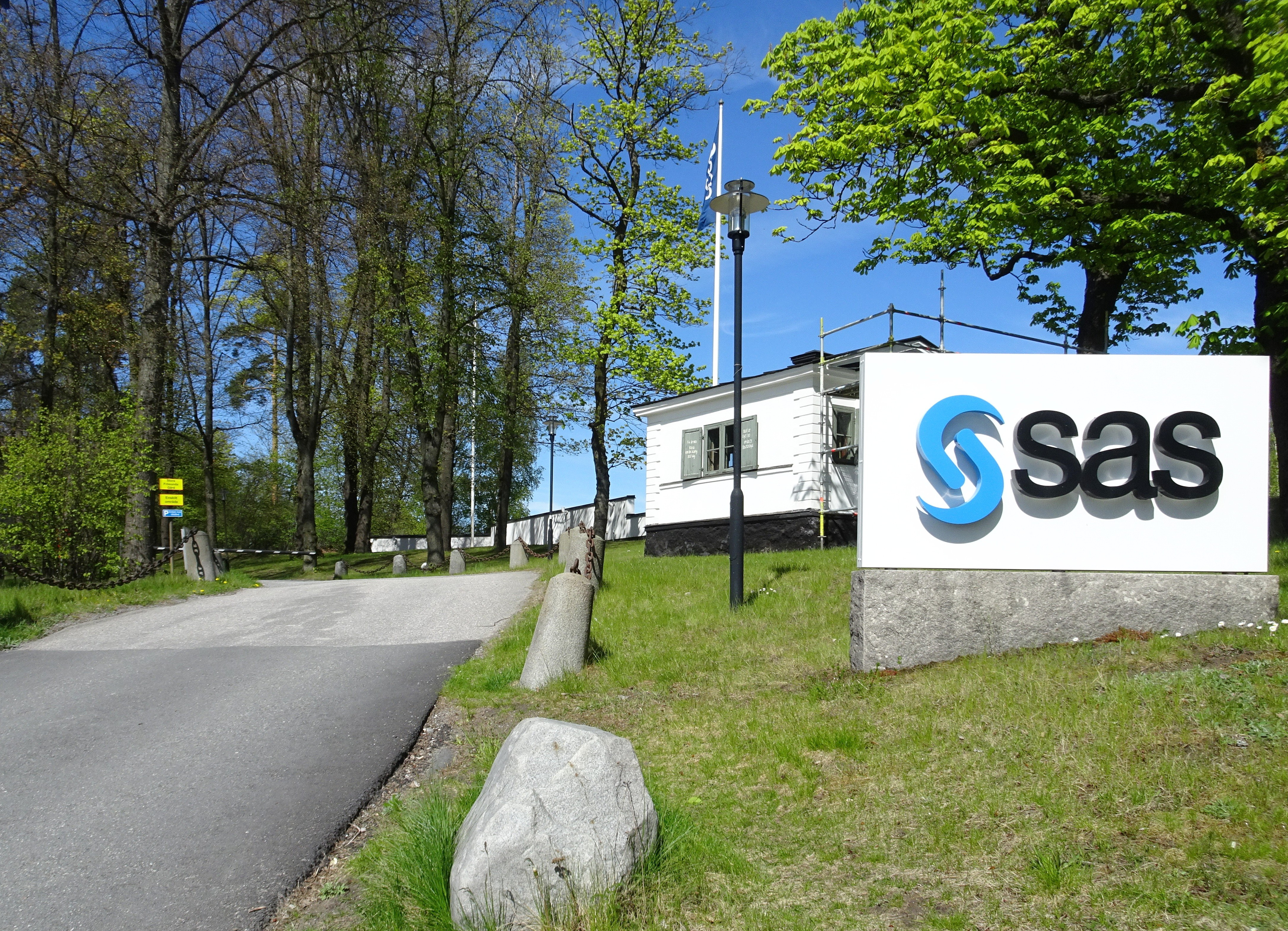 Stora Frösunda gård, infart